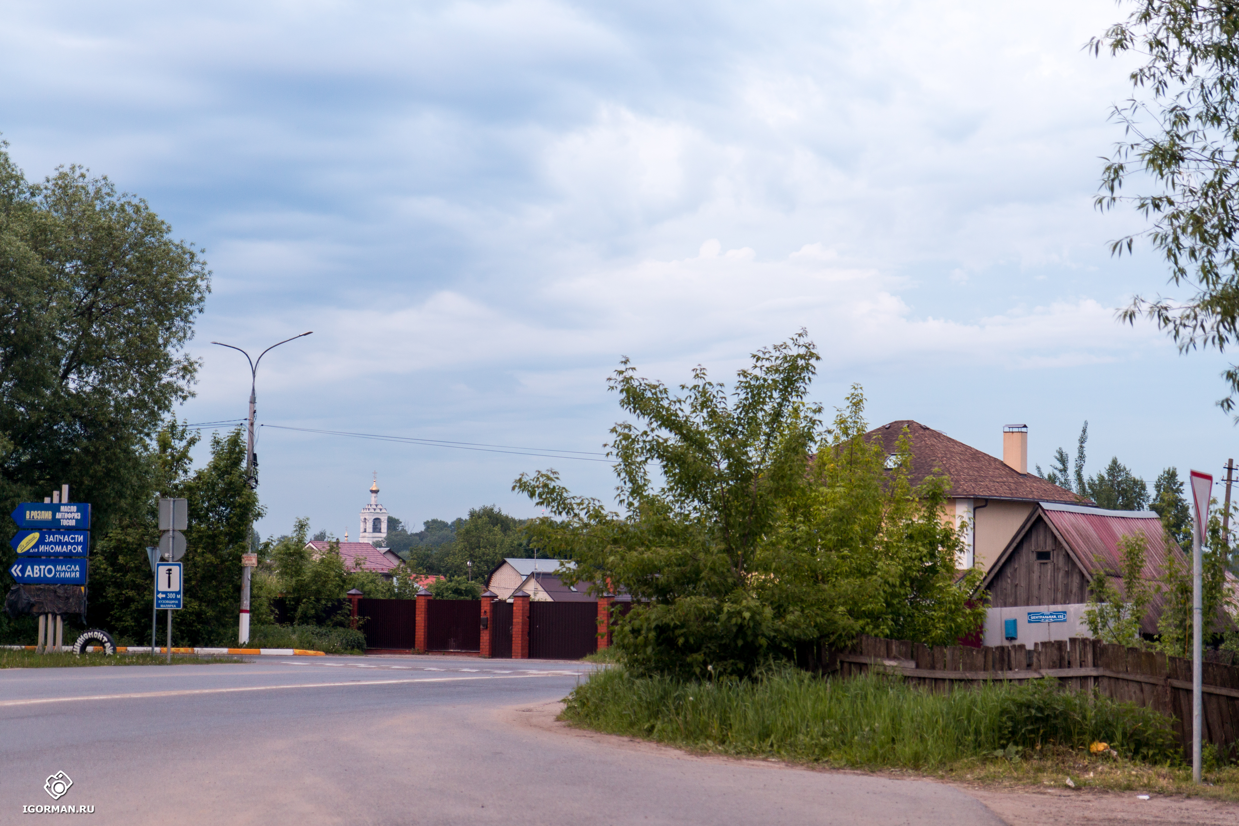 Деревня Литвиново (Раменский район, Московская область)